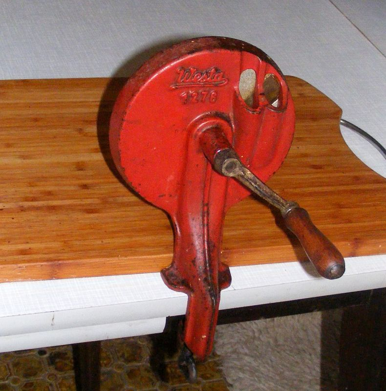 Maschinchen für die Herstellung von Schnippelbohnen